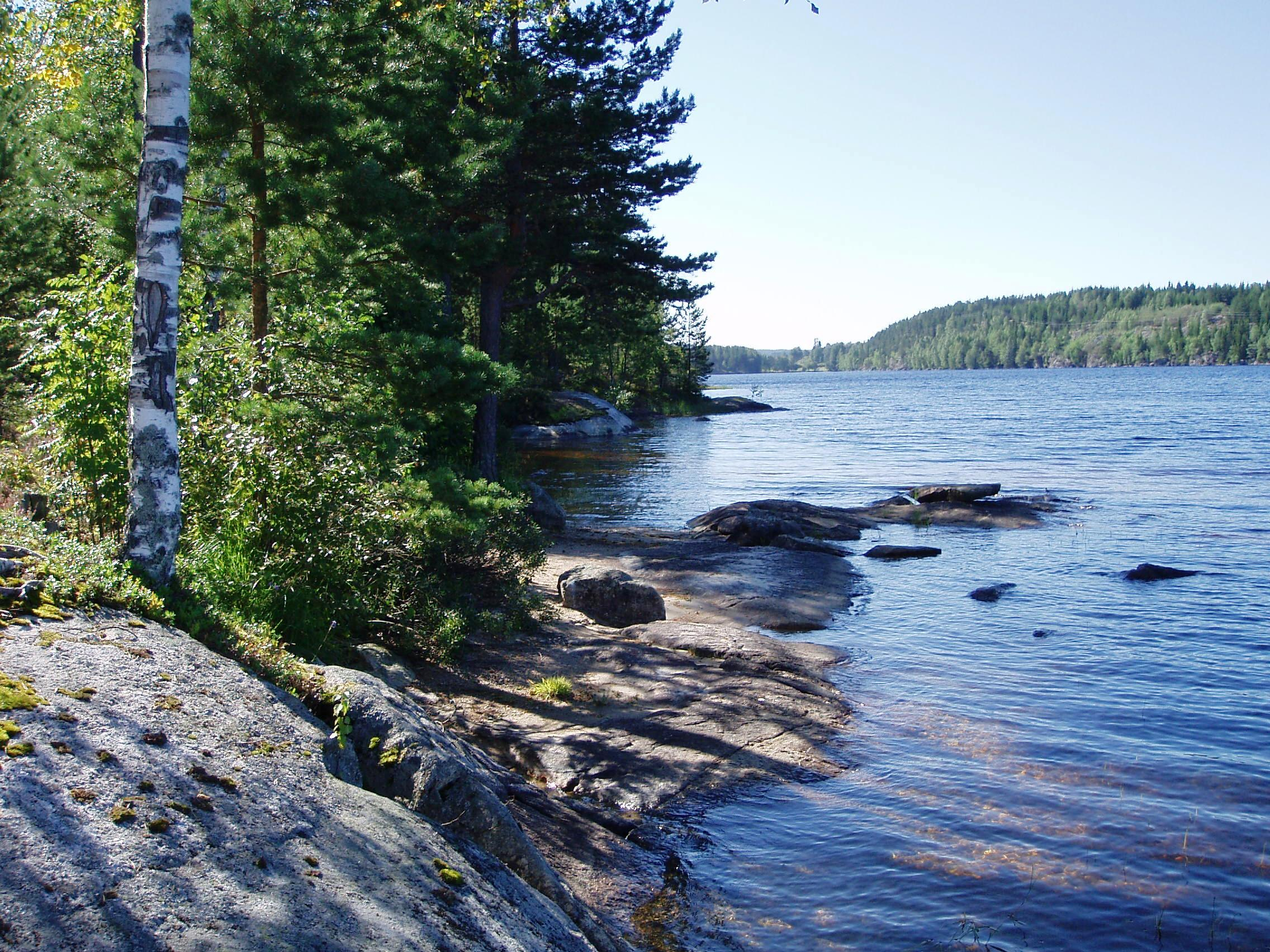 Mjermen i Aurskog-Høland kommune, parti fra Halsnes.